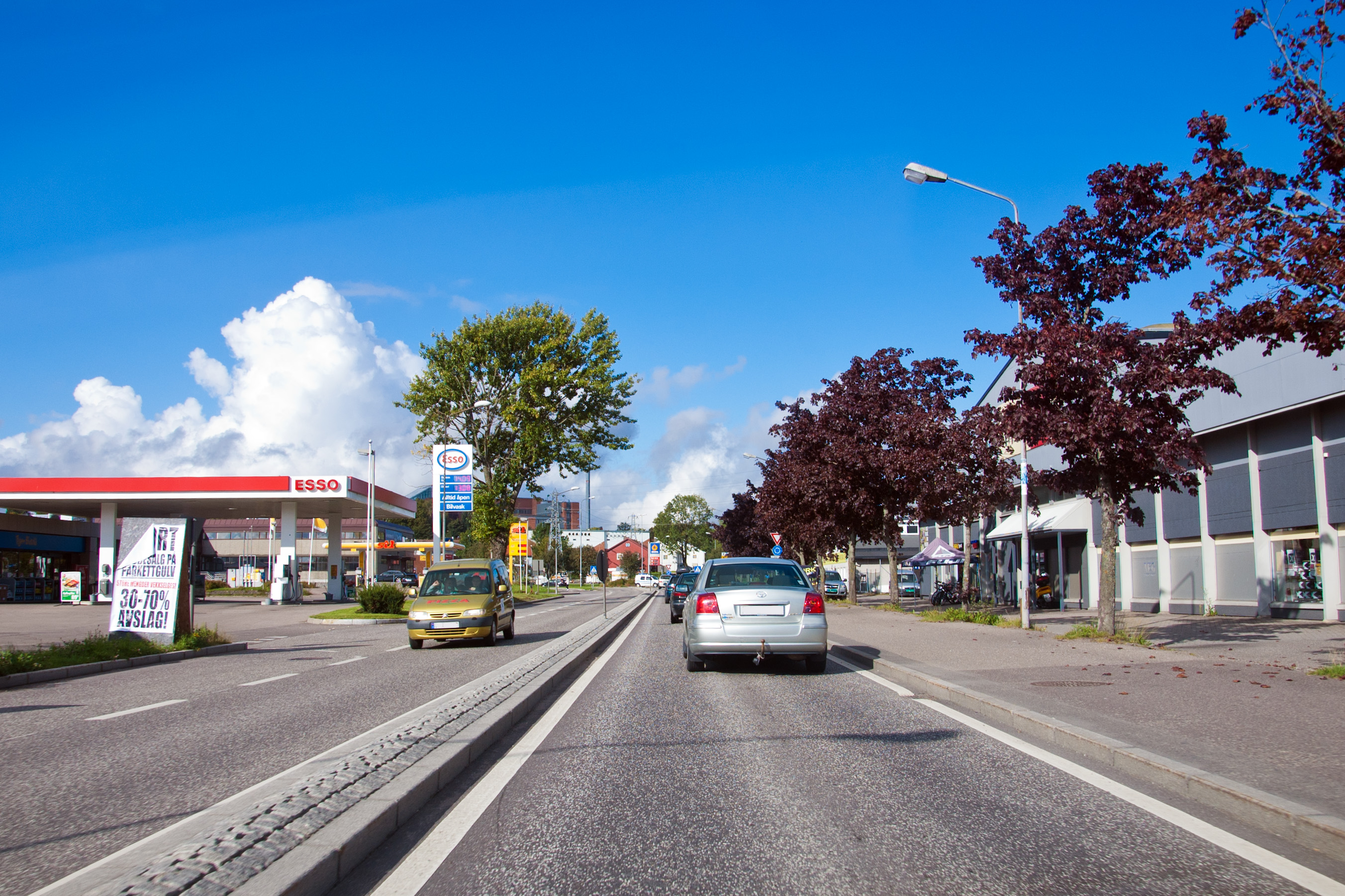 Fylkesvei 469 Halfdan Wilhelmsens allé på Kilen i Tønsberg.